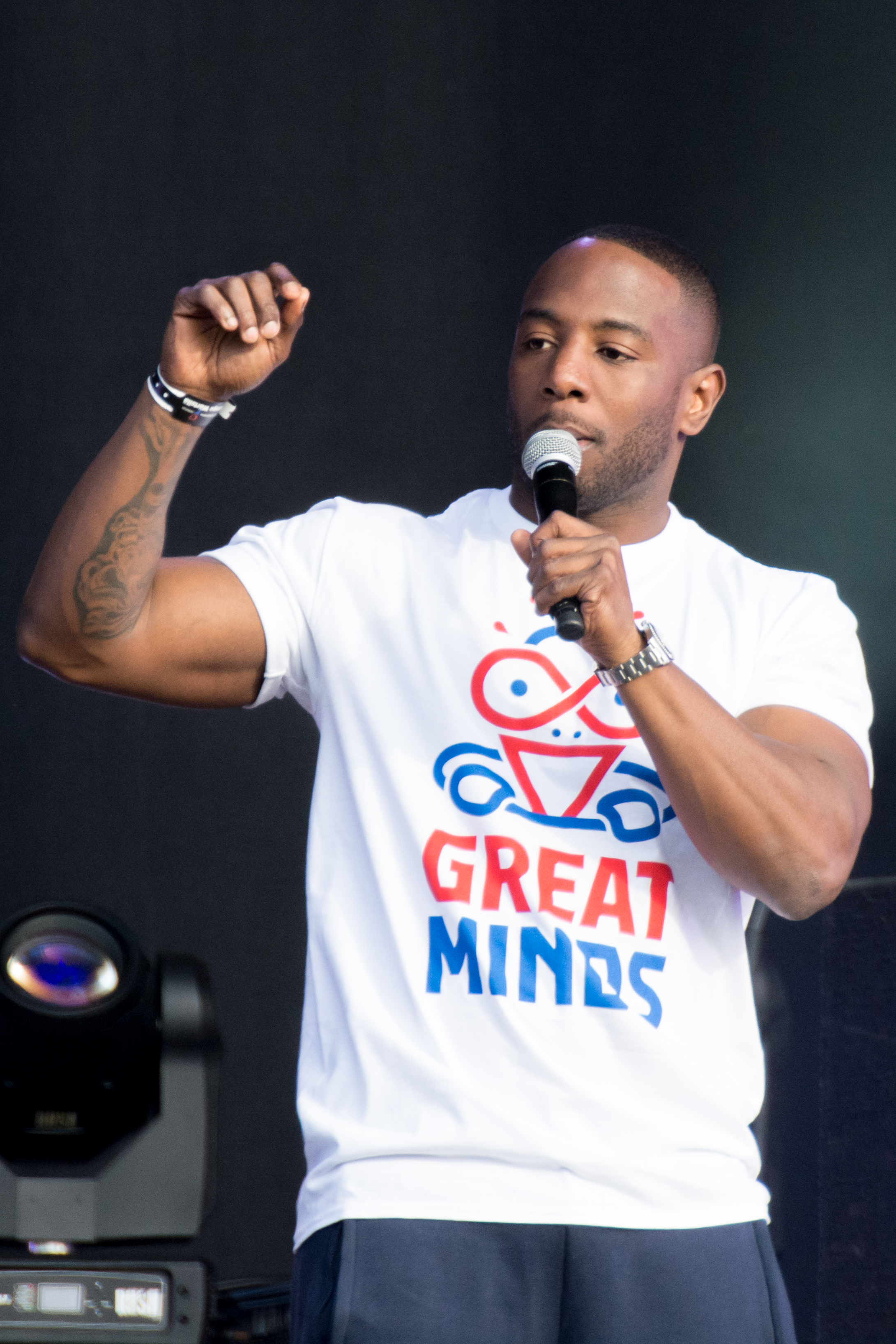 Winston Bergwijn, beter bekend als Winne tijdens het Bevrijdingsfestival in Zwolle met de rapformatie Great Minds (2014).